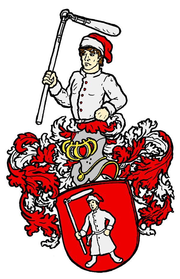 Stammwappen derer von Cotzhausen